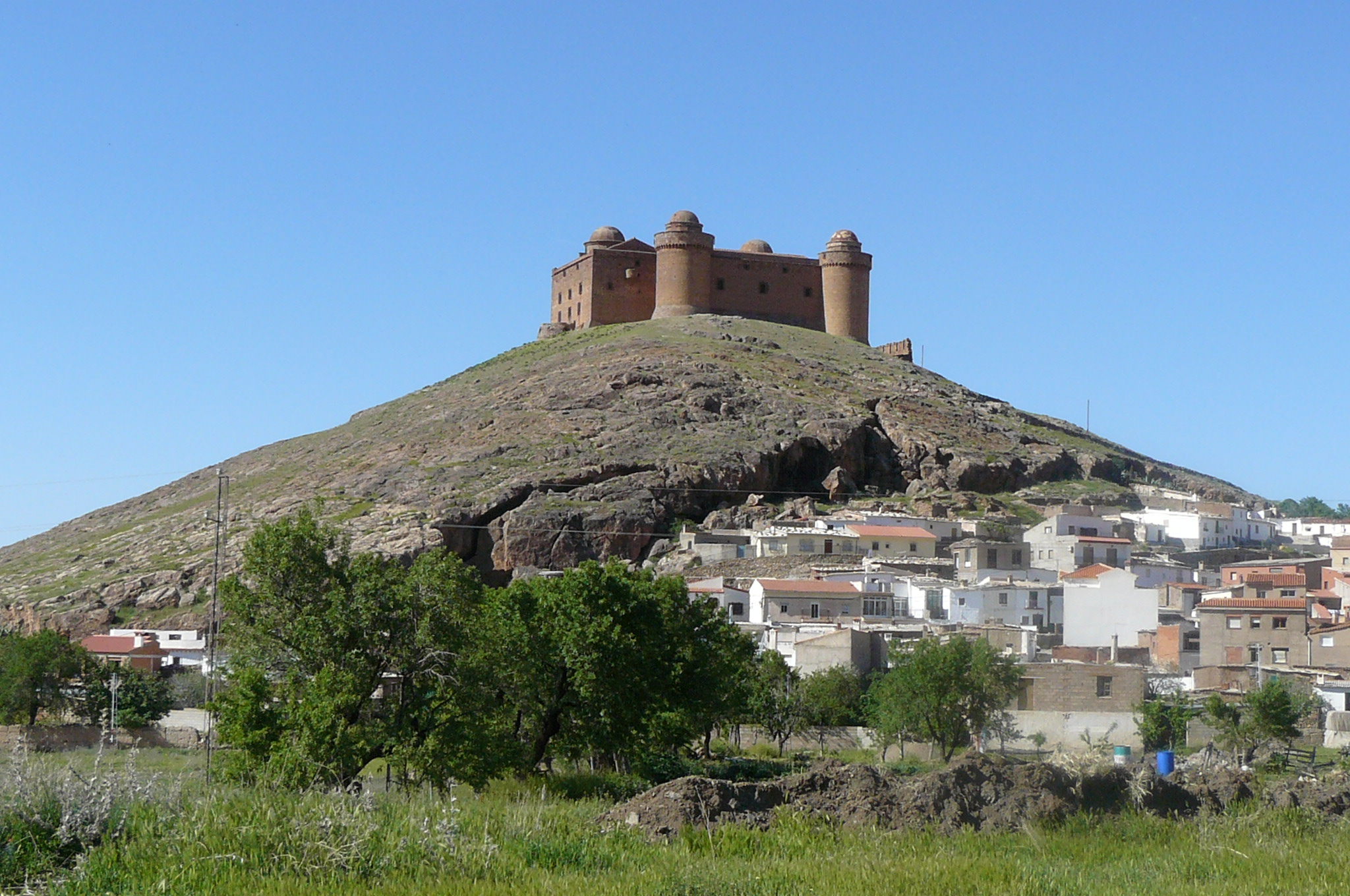 Castillo de la Calahorra y parte de la Calahorra, Granada, España.